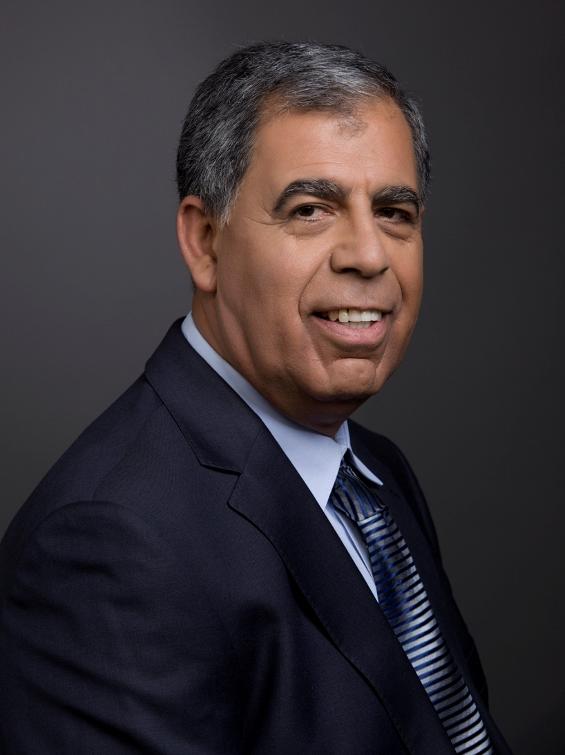 מיקי לוי